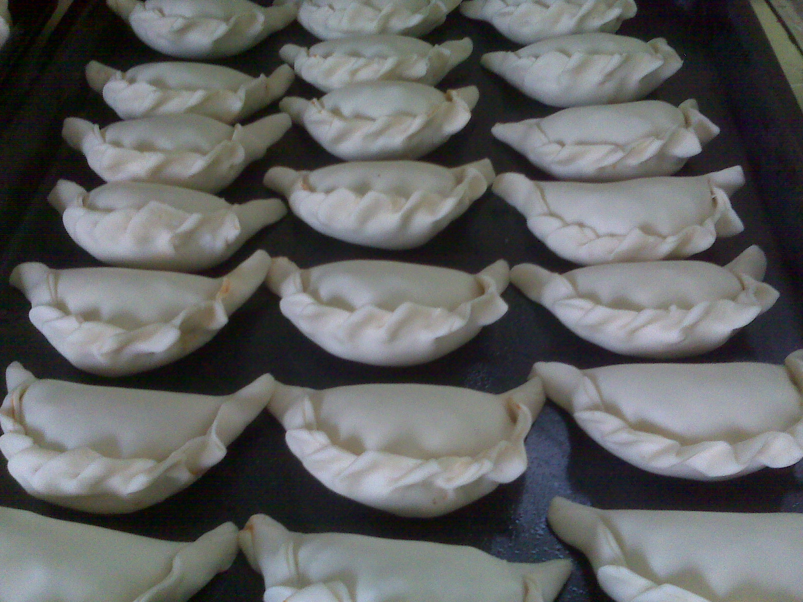 Empanadas, antes de ir al horno. Esta vez, con tapas de empanadas compradas.